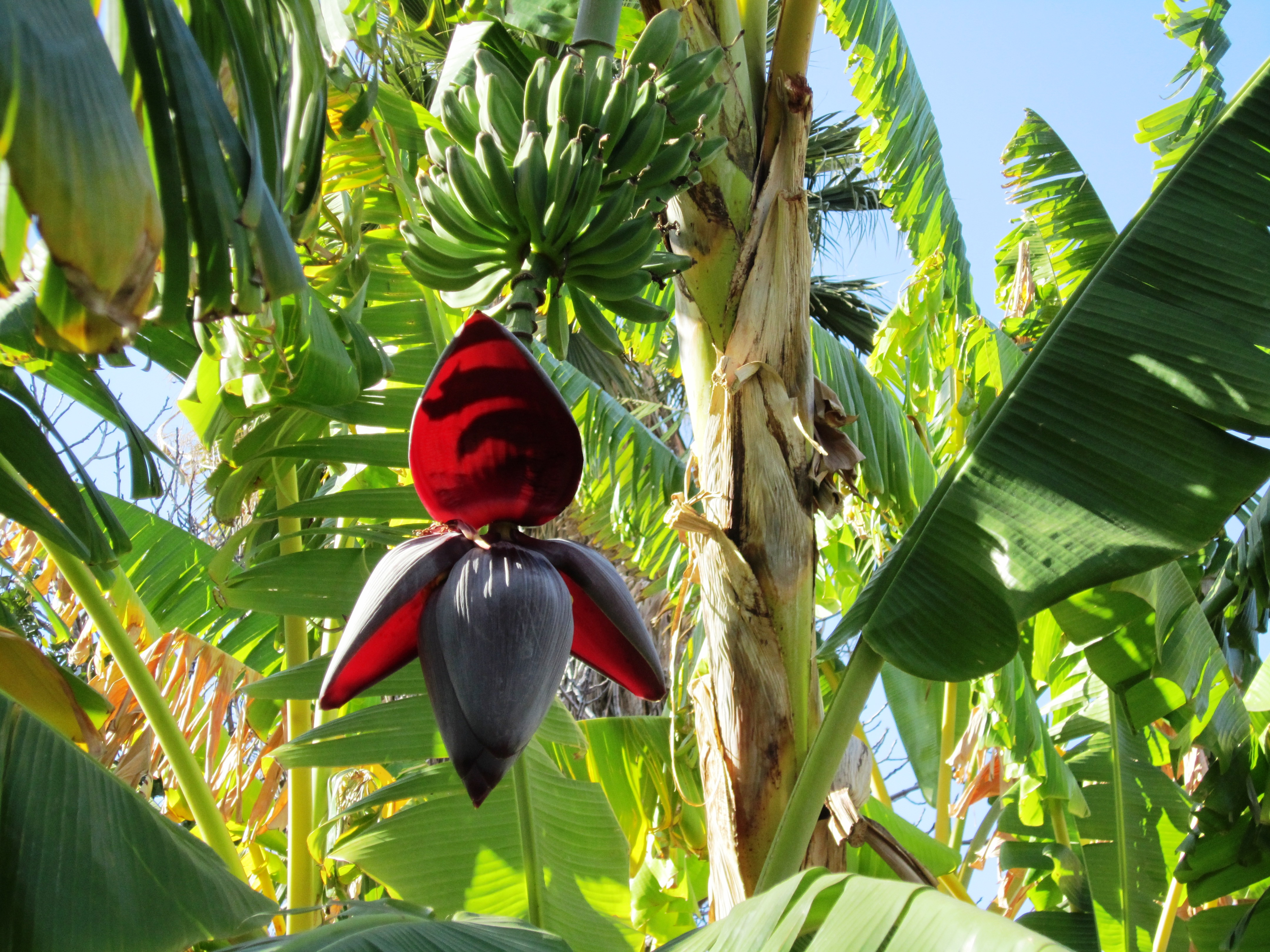 Marokko Marrakesh bananen boom